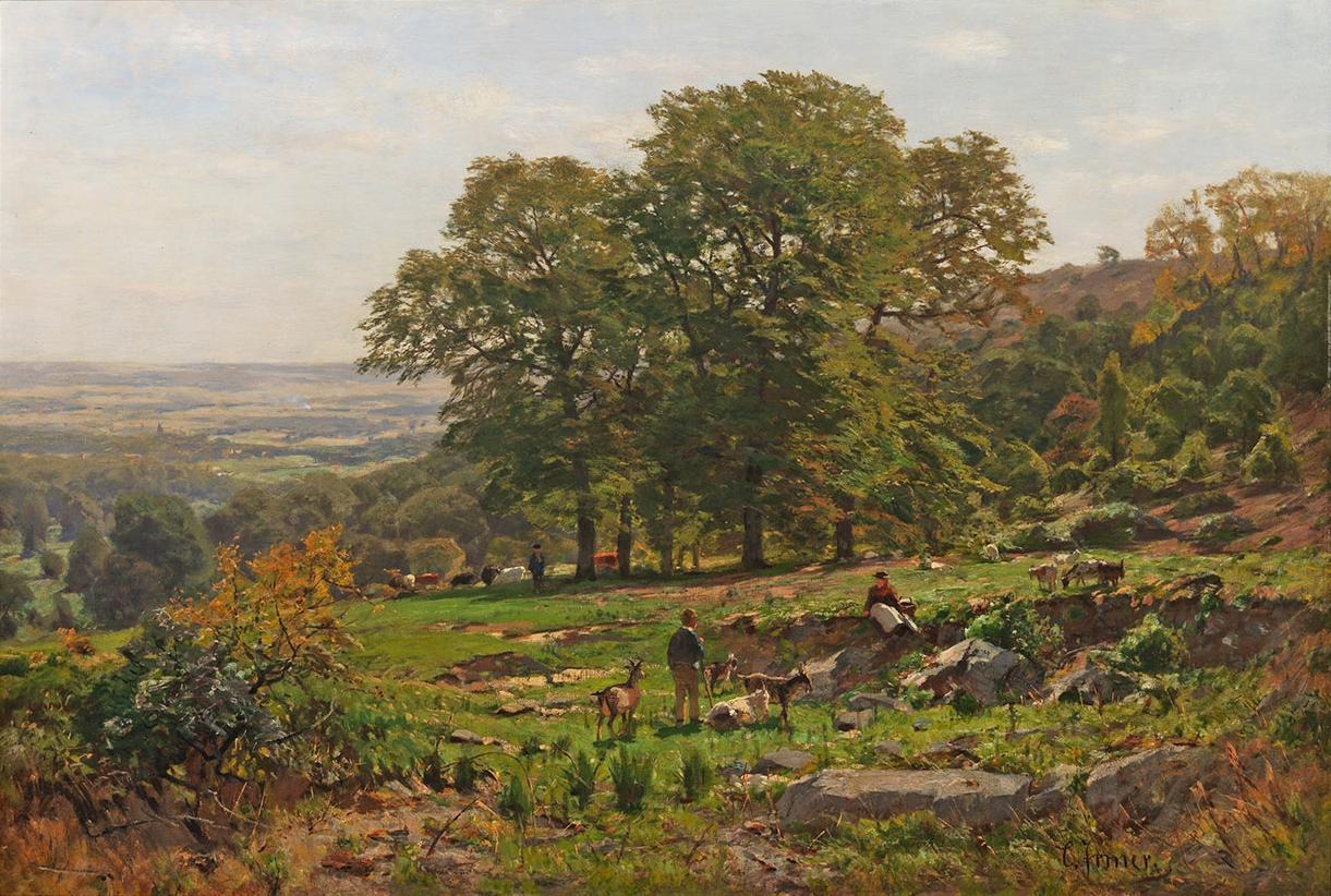 Carl Irmer Große Mittelgebirgslandschaft mit rastenden Hirten an einem Berghang. Öl auf Leinwand, links unten signiert, 80,5 cm x 120,5 cm